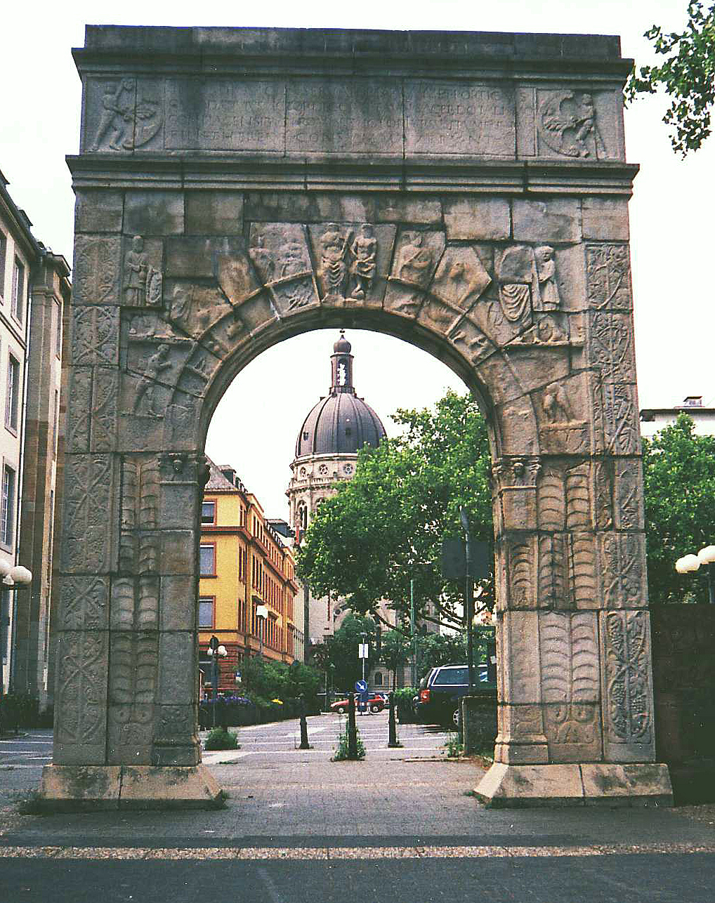 Summary Bildbeschreibung: Dativius-Victor-Bogen und Christuskirche, Mainz Quelle: selbst augenommen Fotograf: Martin C. Doege Datum: 2005-08-10 Licensing